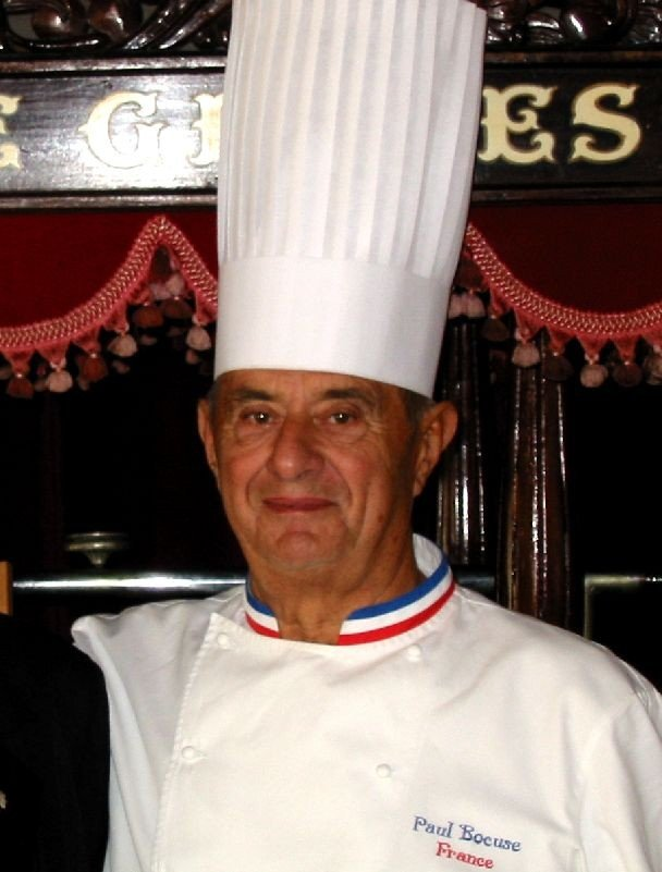 Paul Bocuse à un concours de Cordon Bleu par Marie Thérèse Grappe